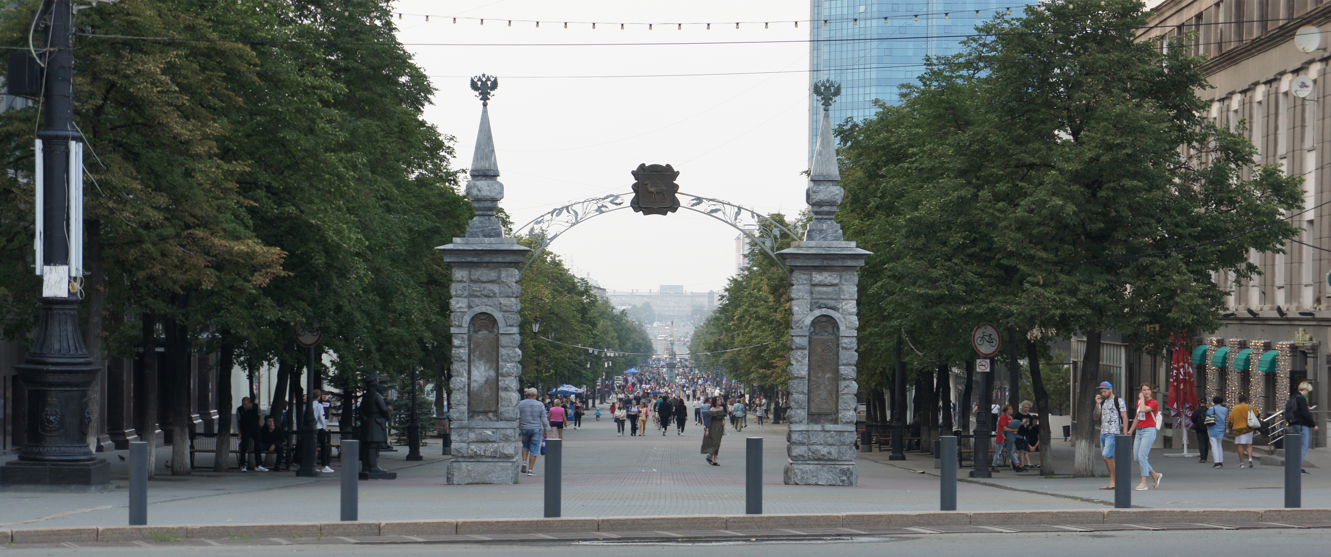 На фото показано начало пешеходной части улицы Кирова в Челябинске со стороны проспекта Ленина